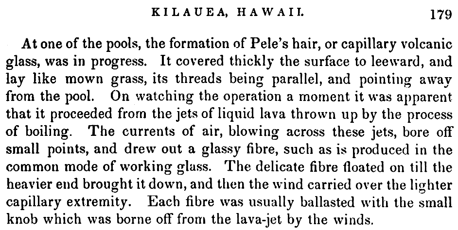 Первое описание Волос Пеле, 1849 год.